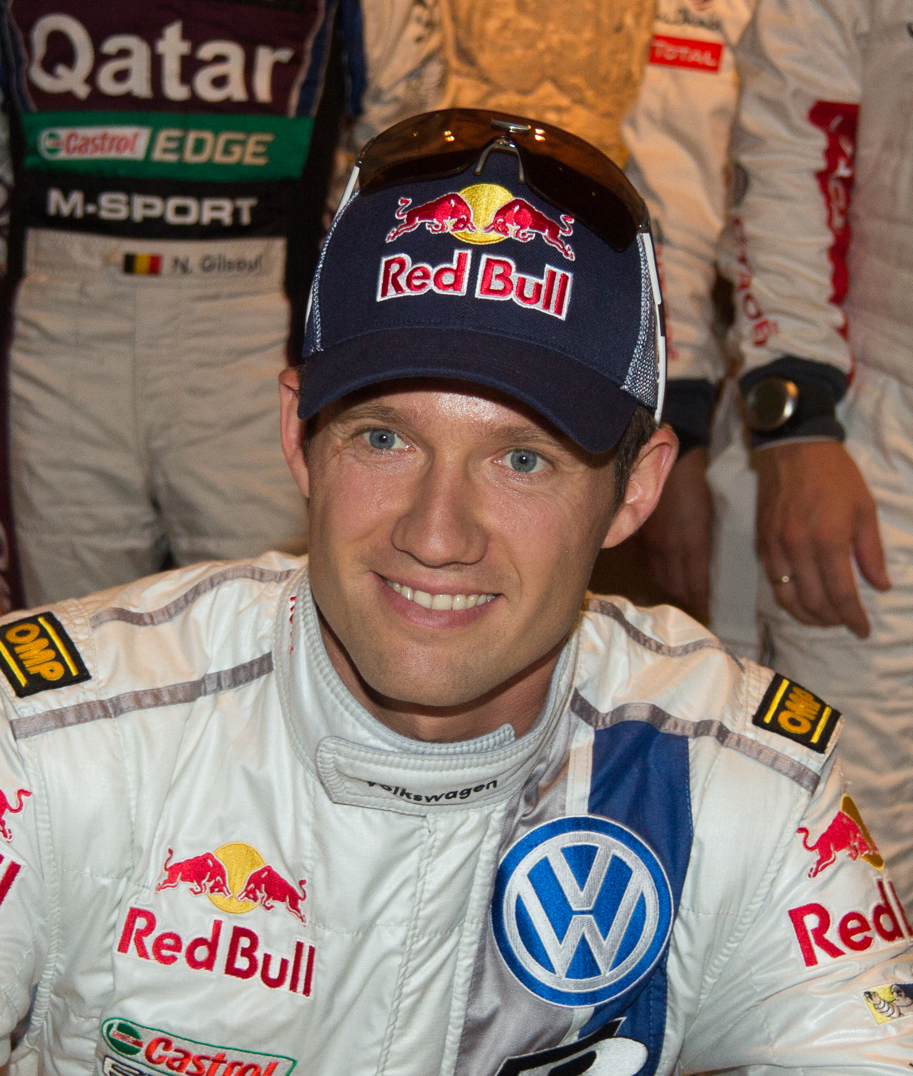 ADAC Rallye Deutschland 2013 - Empfang der Stadt Köln - Sébastien Ogier